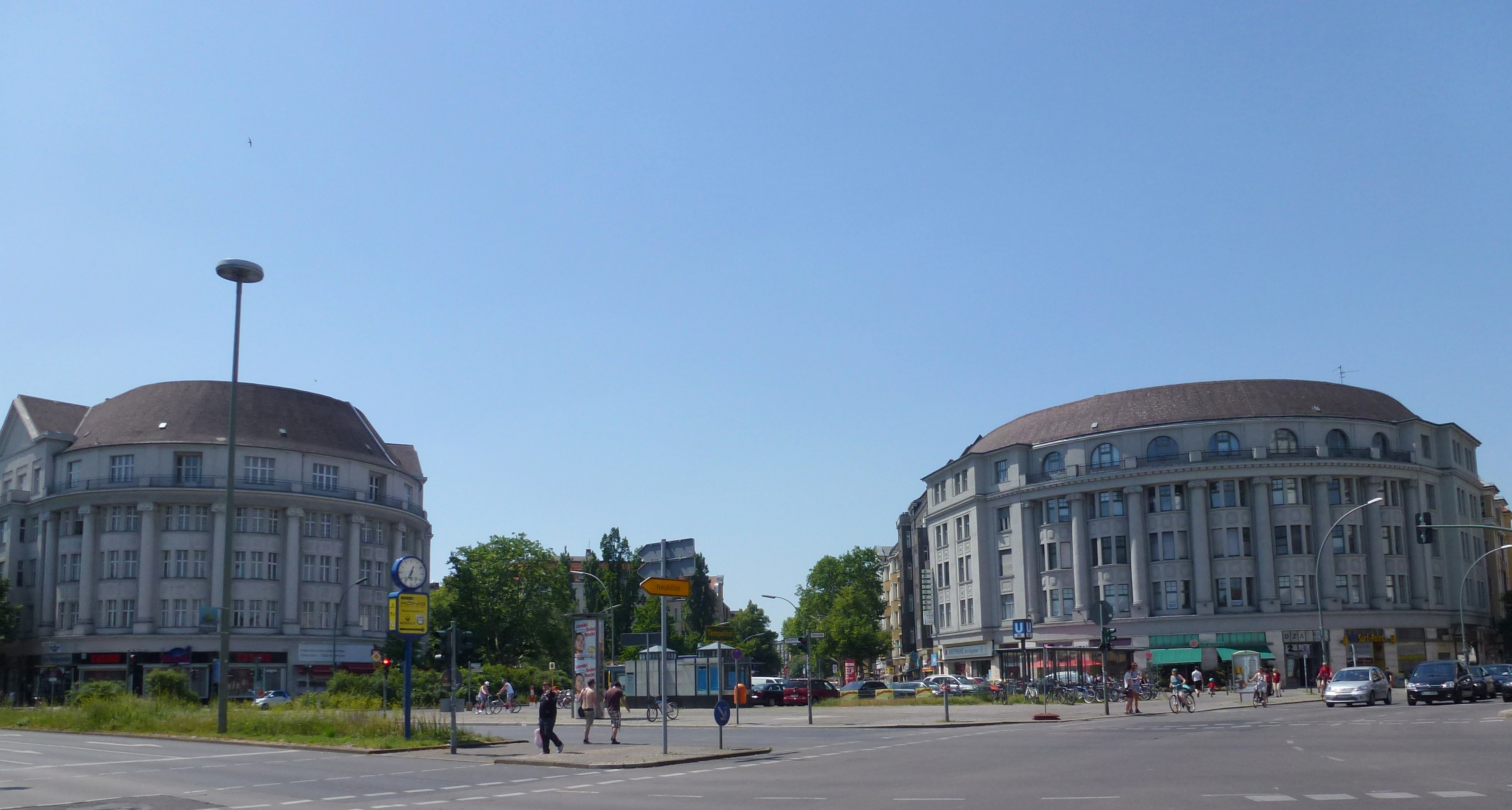 Tempelhof Neu-Tempelhof Eingangsbauten